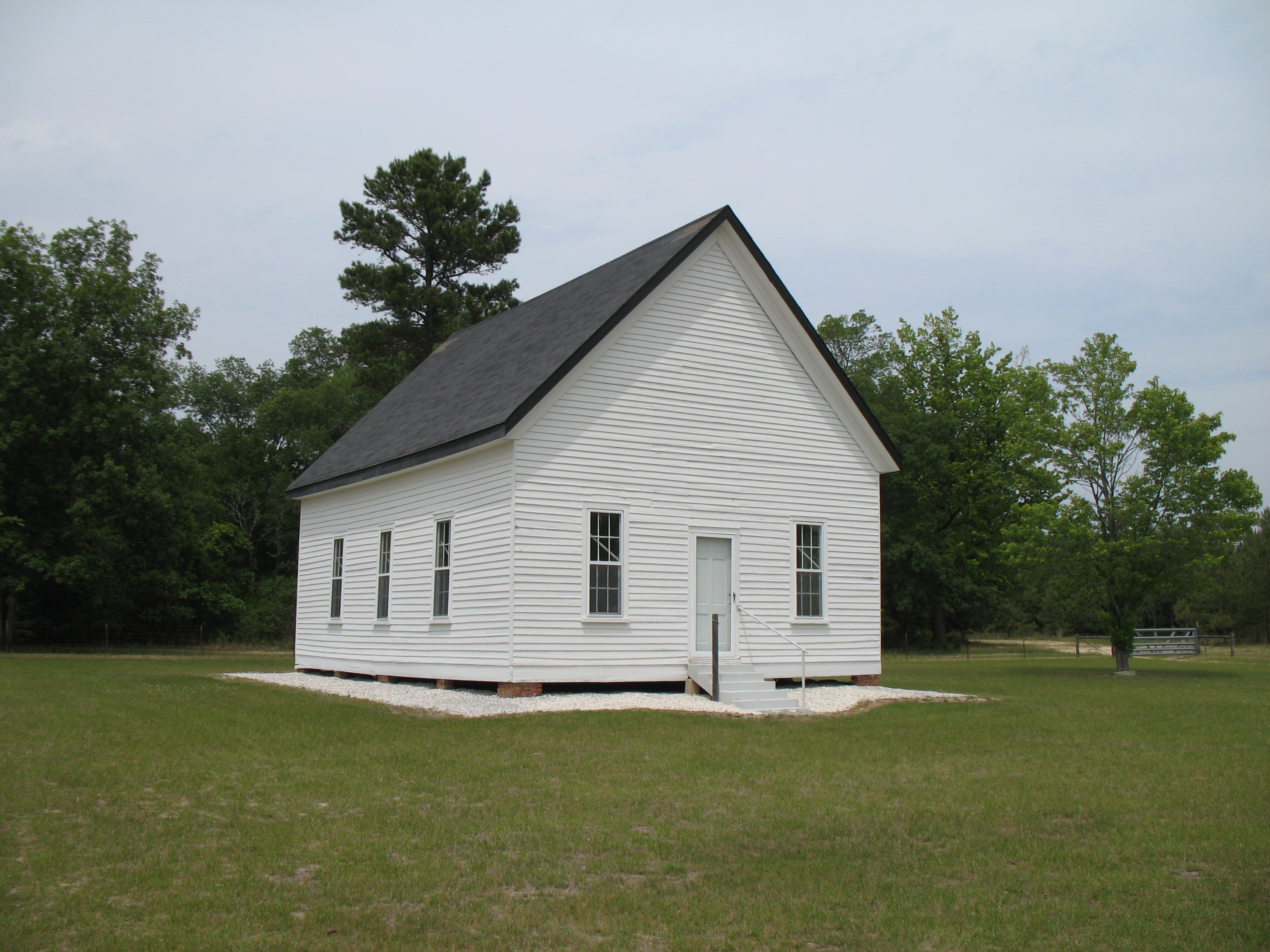 Pike County, Alabama.